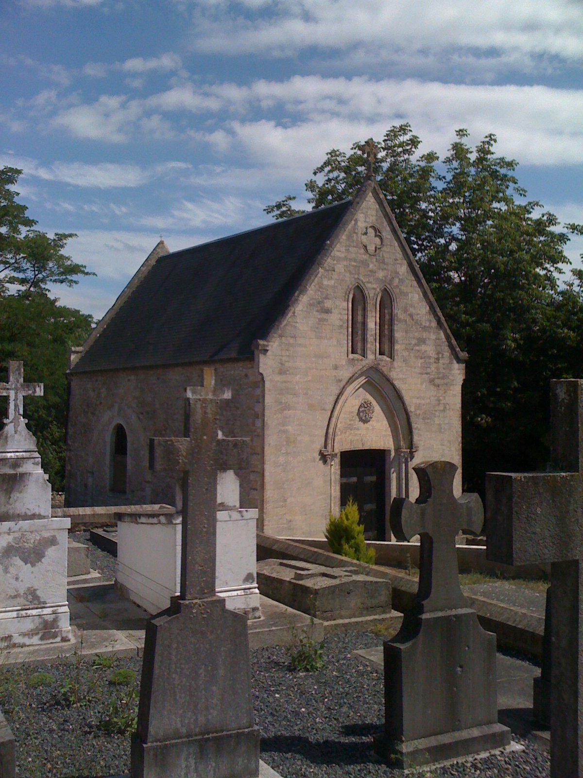 chapelle Saint-Nicolas du Molay (commune du Molay-Littry), Calvados, Basse-Normandie.